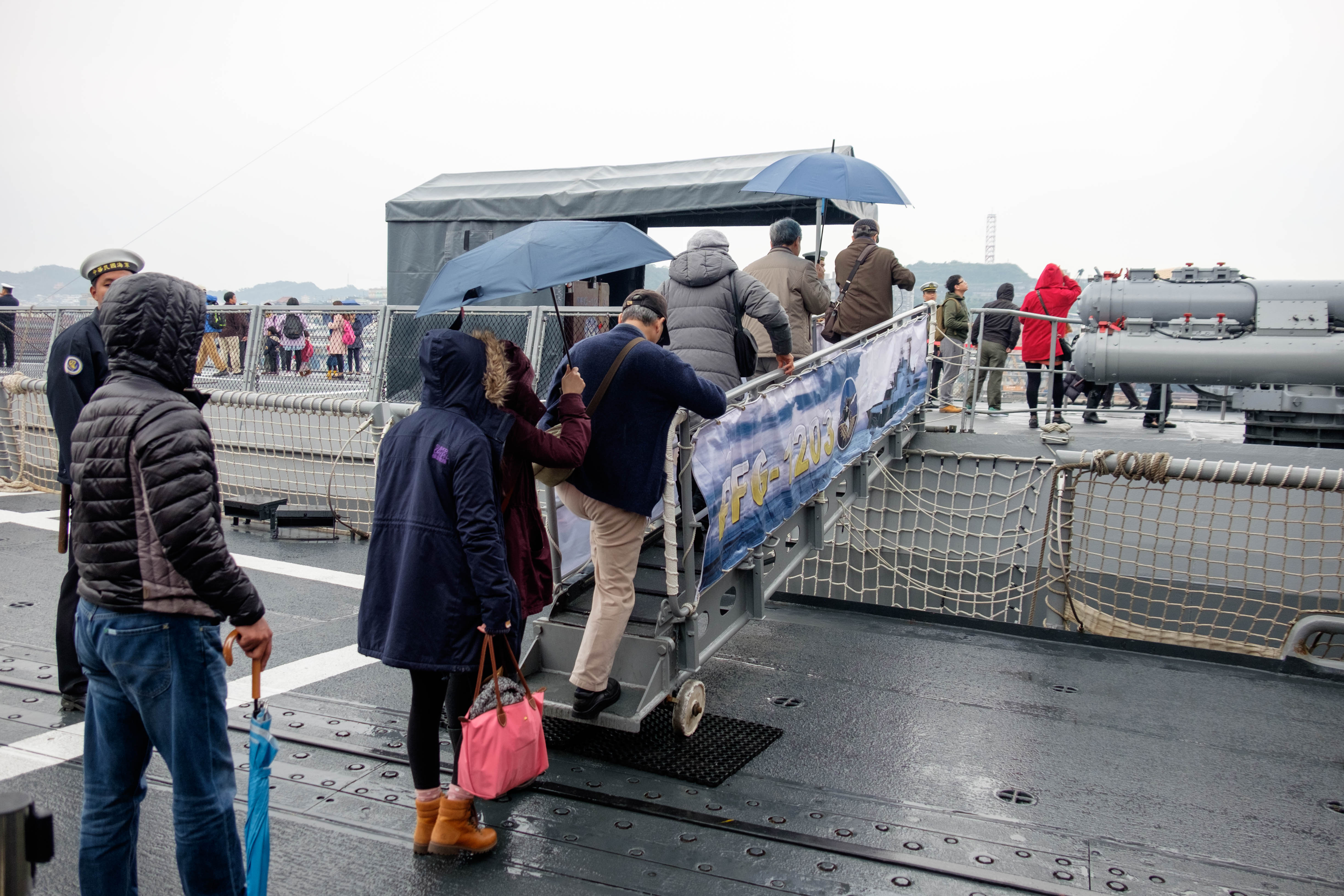 中文（台灣）: 海軍106年敦睦遠航訓練支隊訪問基隆，參觀完飛彈巡防艦張騫（PFG2-1109）的遊客從直升機甲板舷門進入飛彈巡防艦西寧（PFG-1203）。